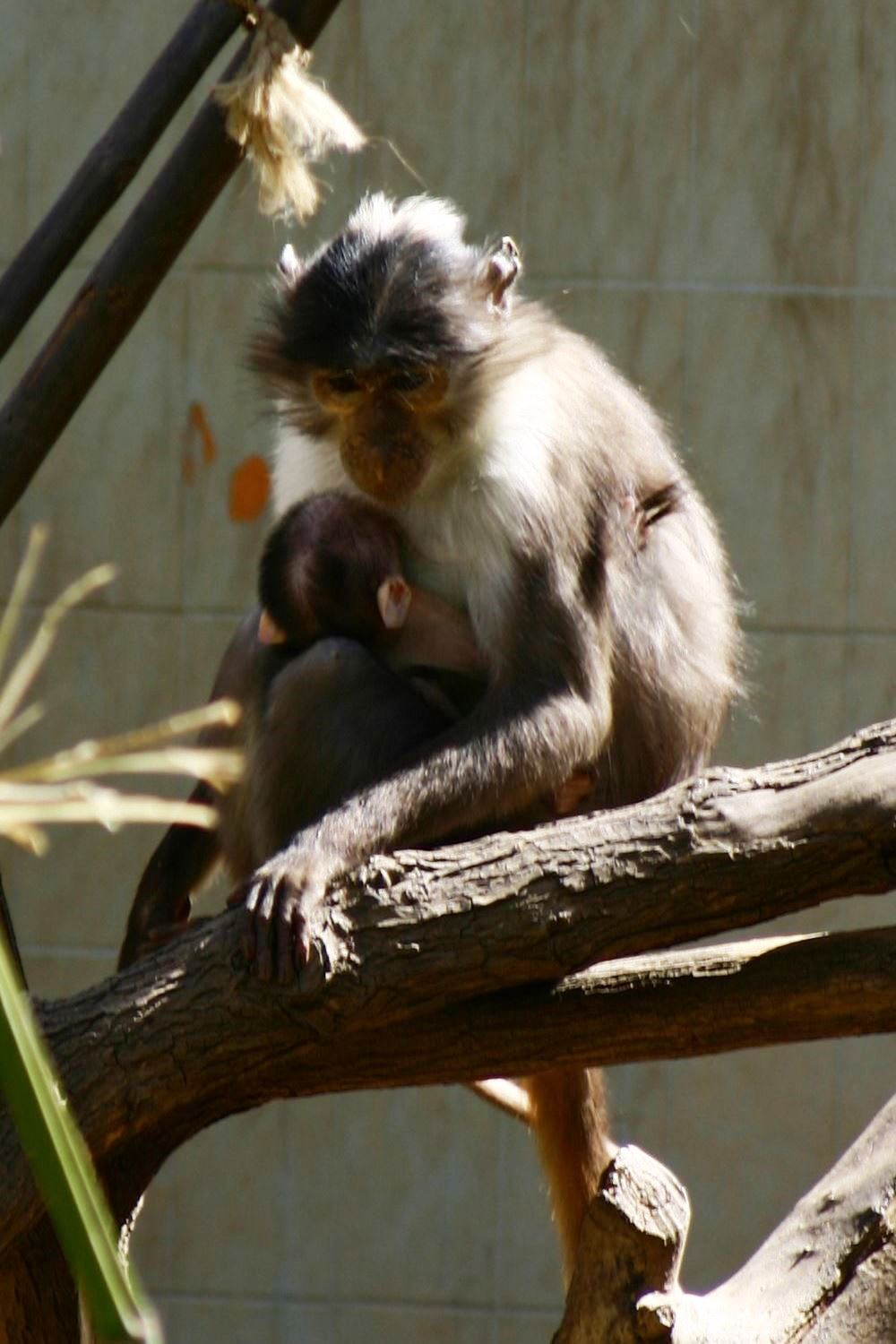 Чёрный мангабей (Cercocebus atys lunulatus)